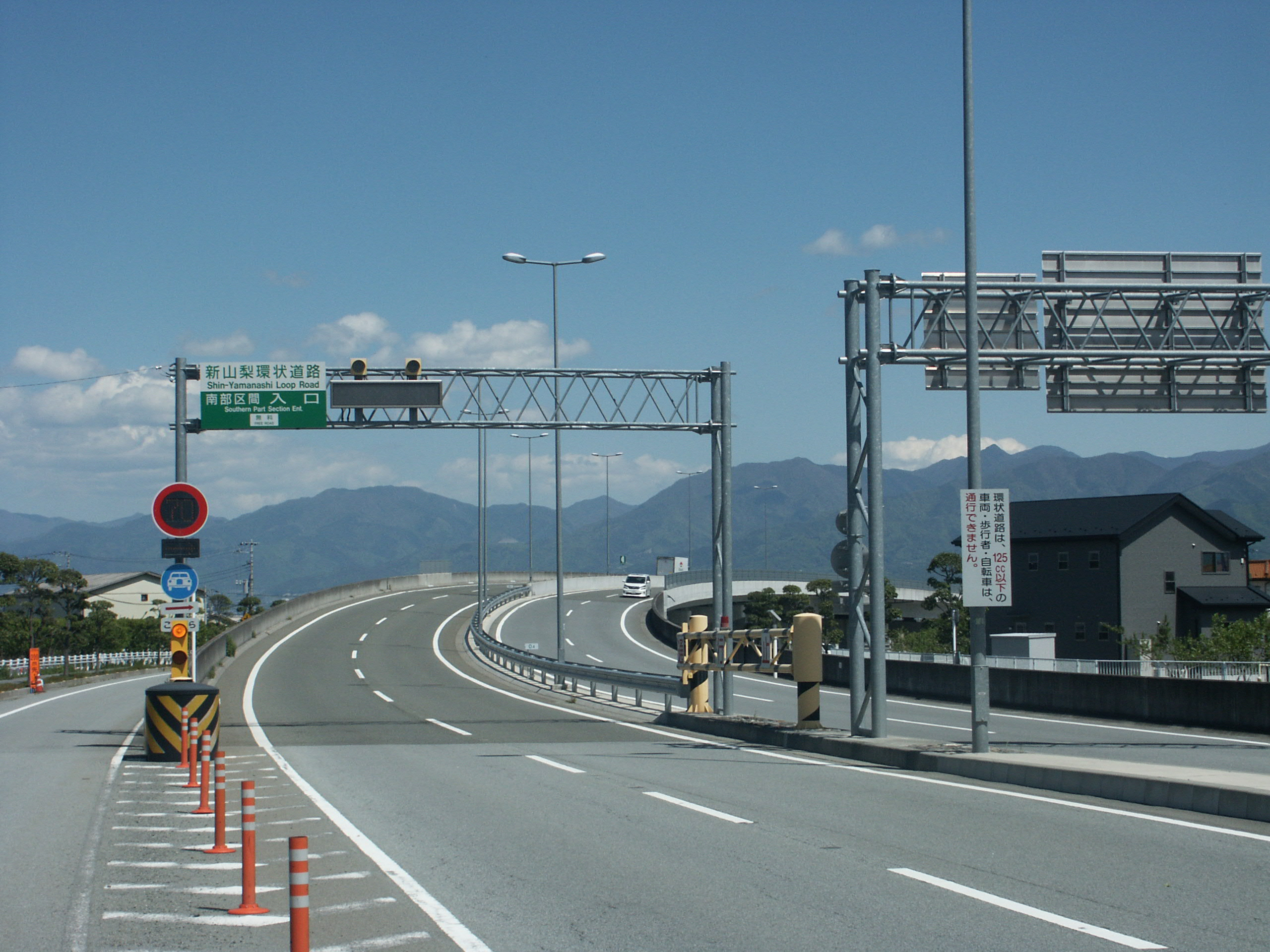 新山梨環状道路南アルプスインターチェンジ（南部区間入口）付近